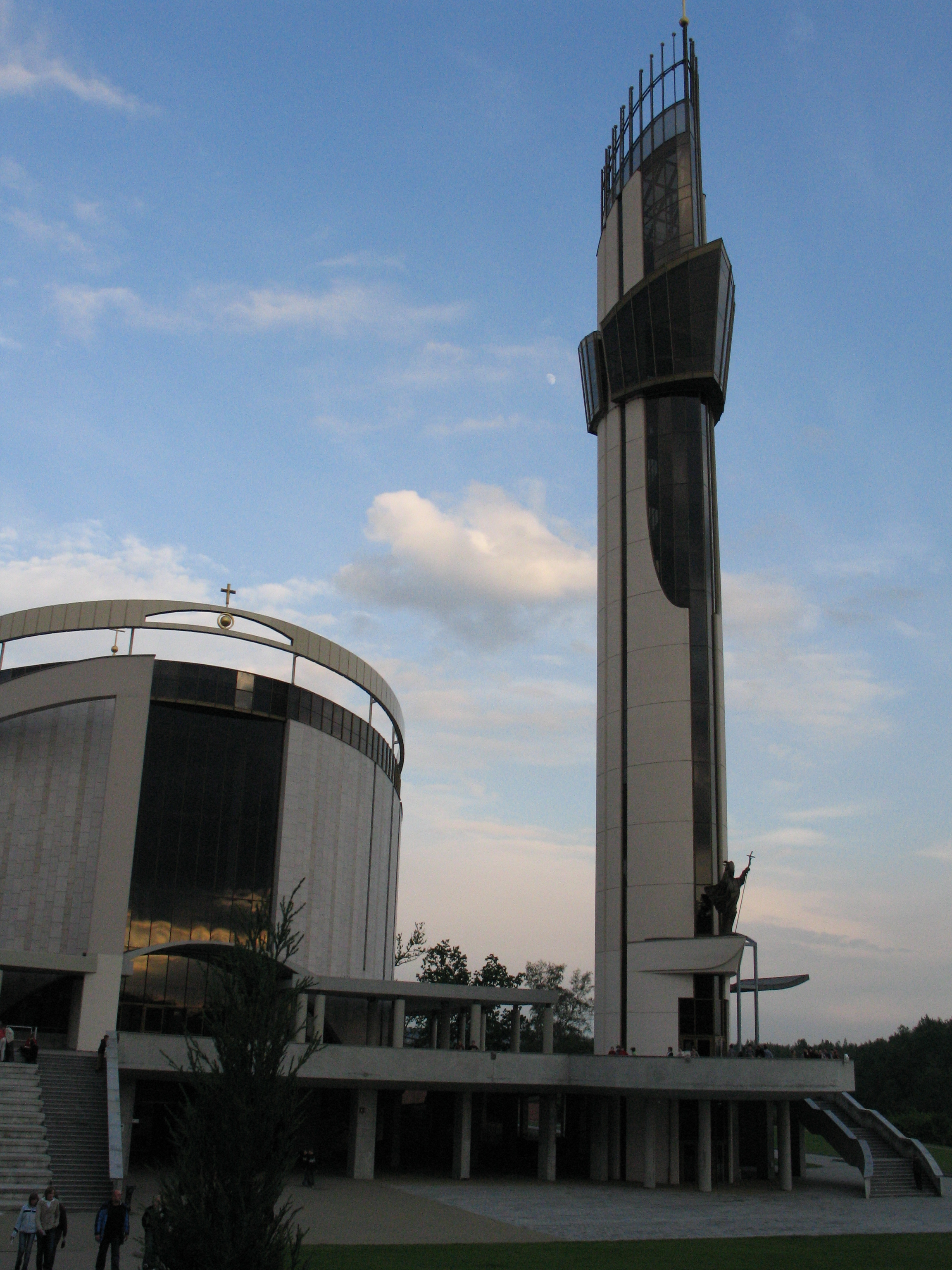 Bazylika Bożego Miłosierdzia w Krakowie Łagiewnikach